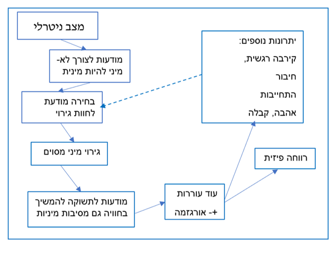 מודל התגובה המינית האנושית שהציע ד"ר רוזמרי בסון